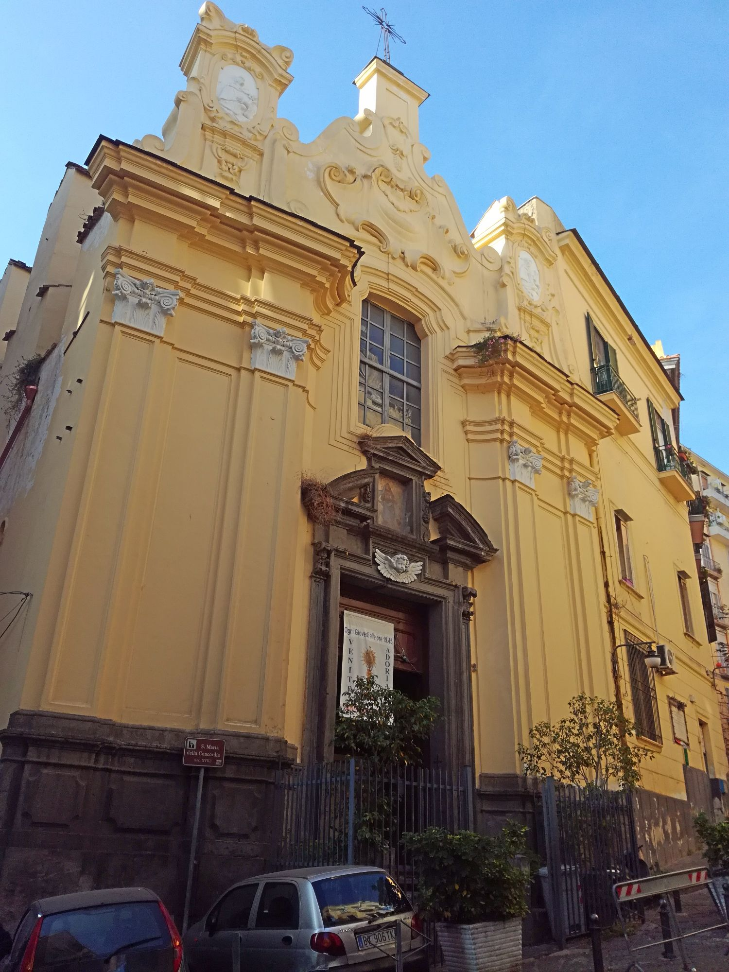 Chiesa di Santa Maria della Concordia (Napoli)